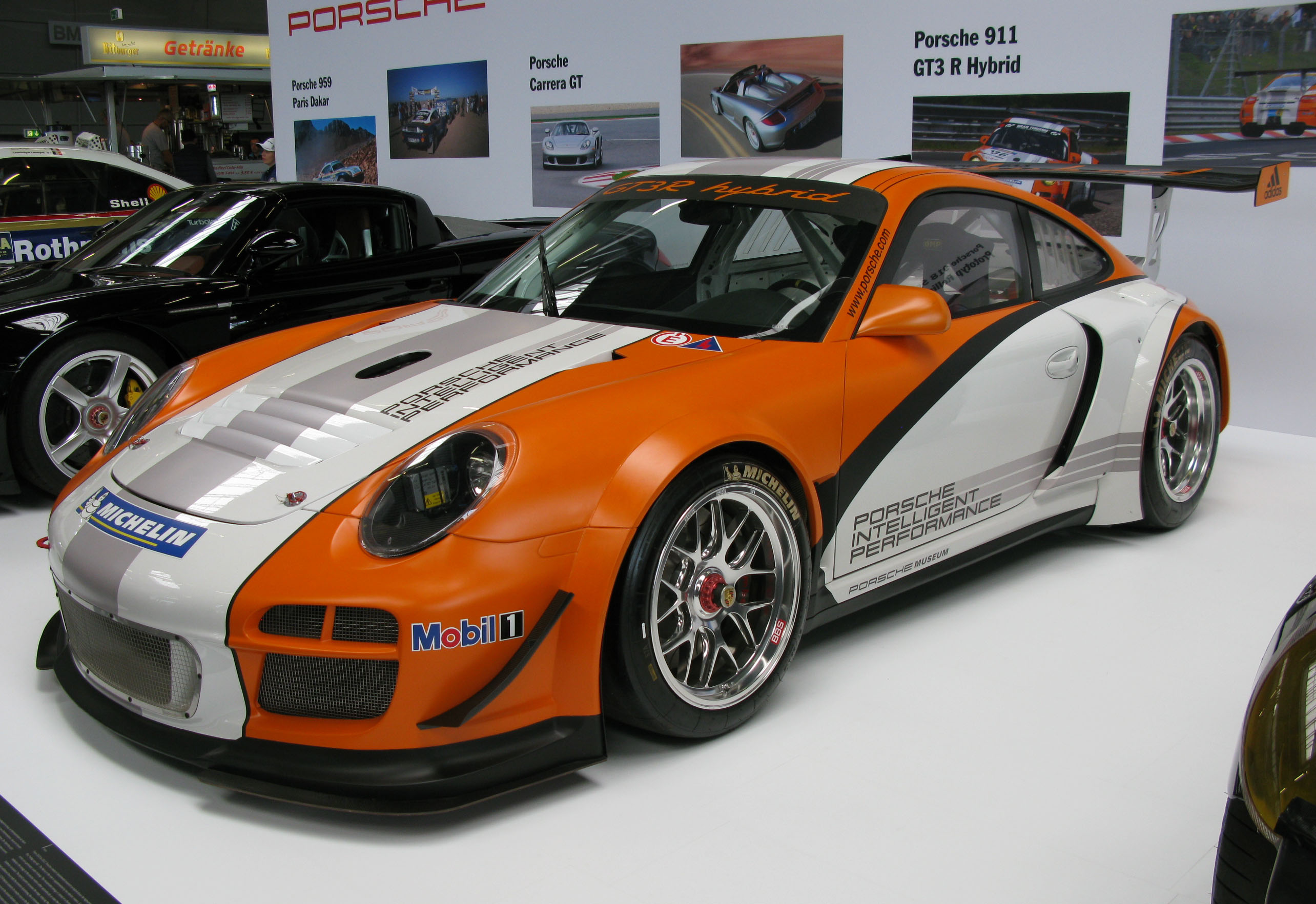 Porsche 911 GT3 R Hybrid